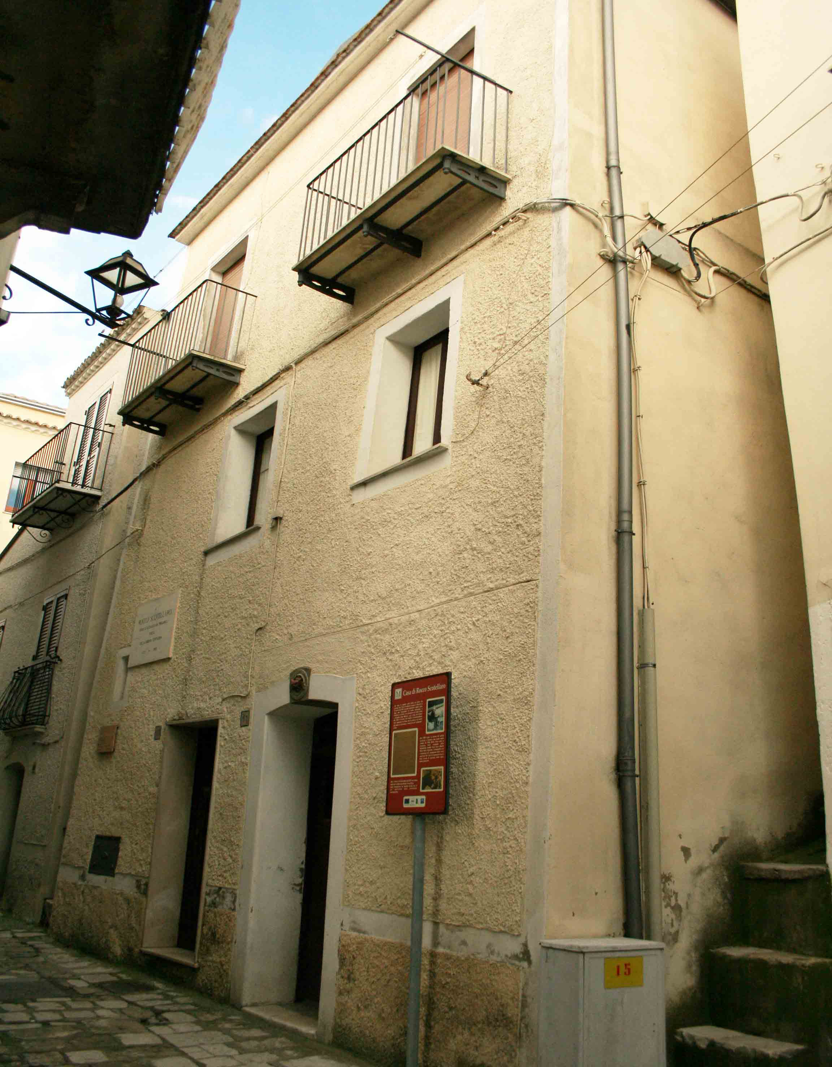 Rocco Stasi, fatta da me, sono l'autore. Casa di Rocco Scotellaro GFDL